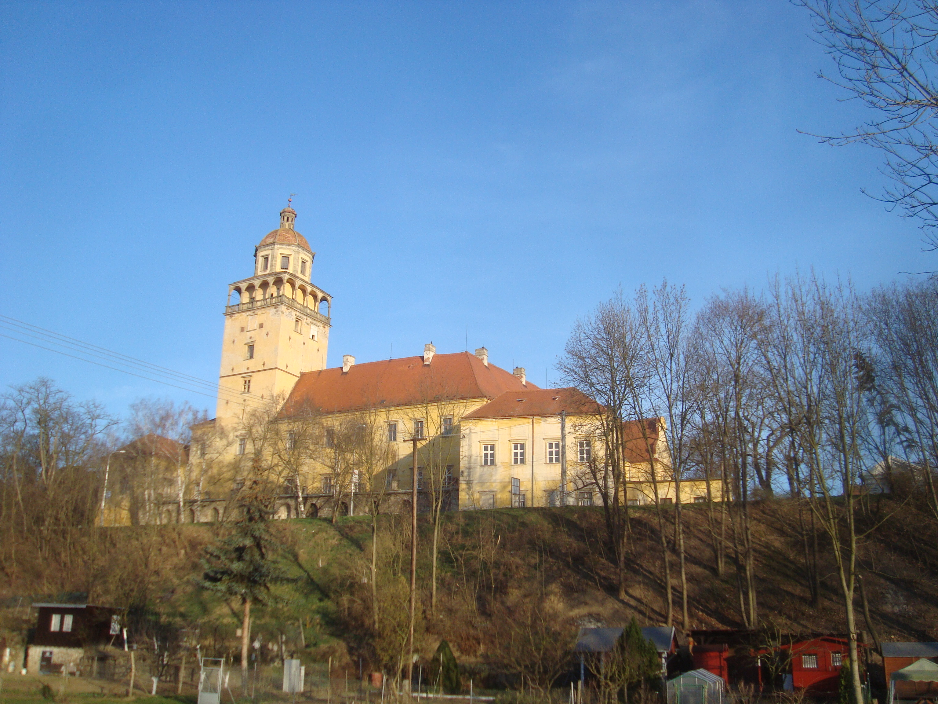 Moravský Krumlov zámek, pohled od autobusového nádraží